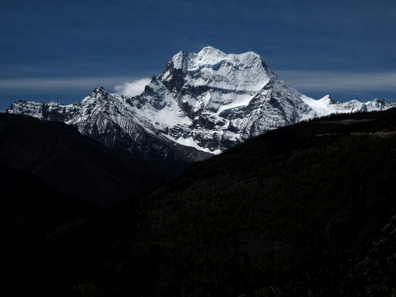 仙乃日雪山，中国四川稻城亚丁。摄影，雷淼，2011年5月1日。